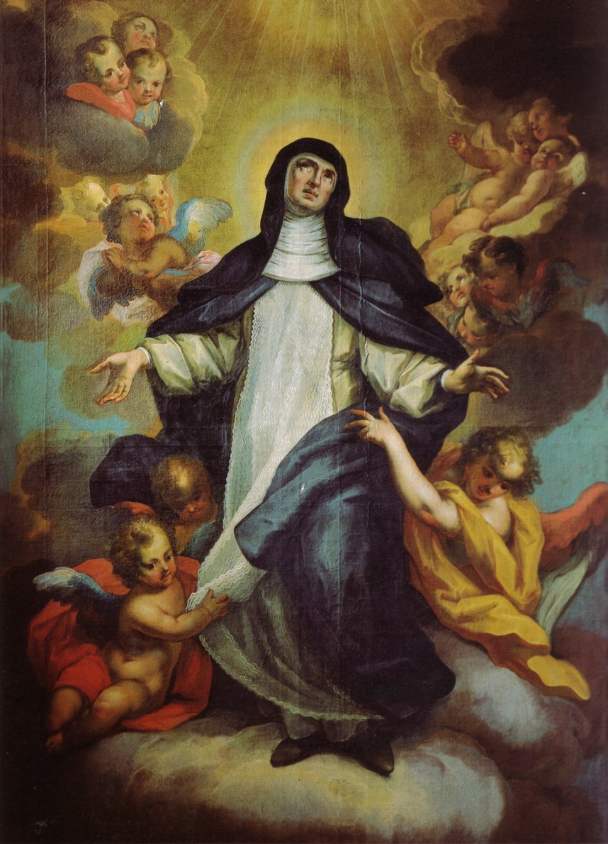 Apotheose der seligen Hemma; Öl auf Leinwand/Oil on canvas, H 300 x B 180 cm